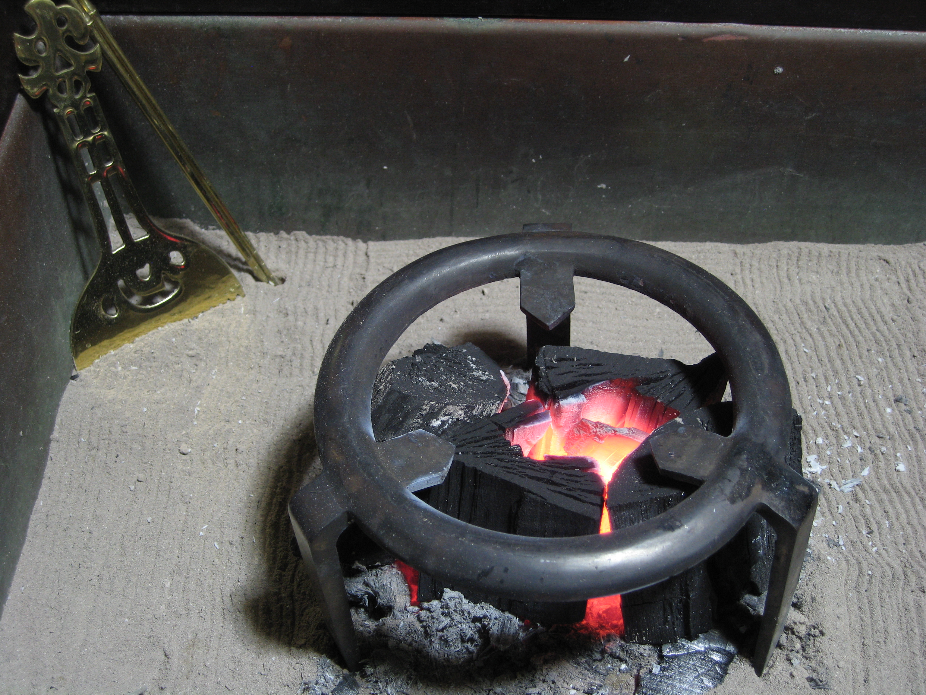 日本の真鍮製の五徳と火箸と灰均し